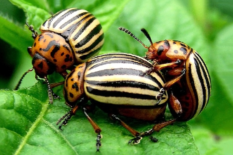 Leptinotarsa decemlineata, A Coruña, Galiza